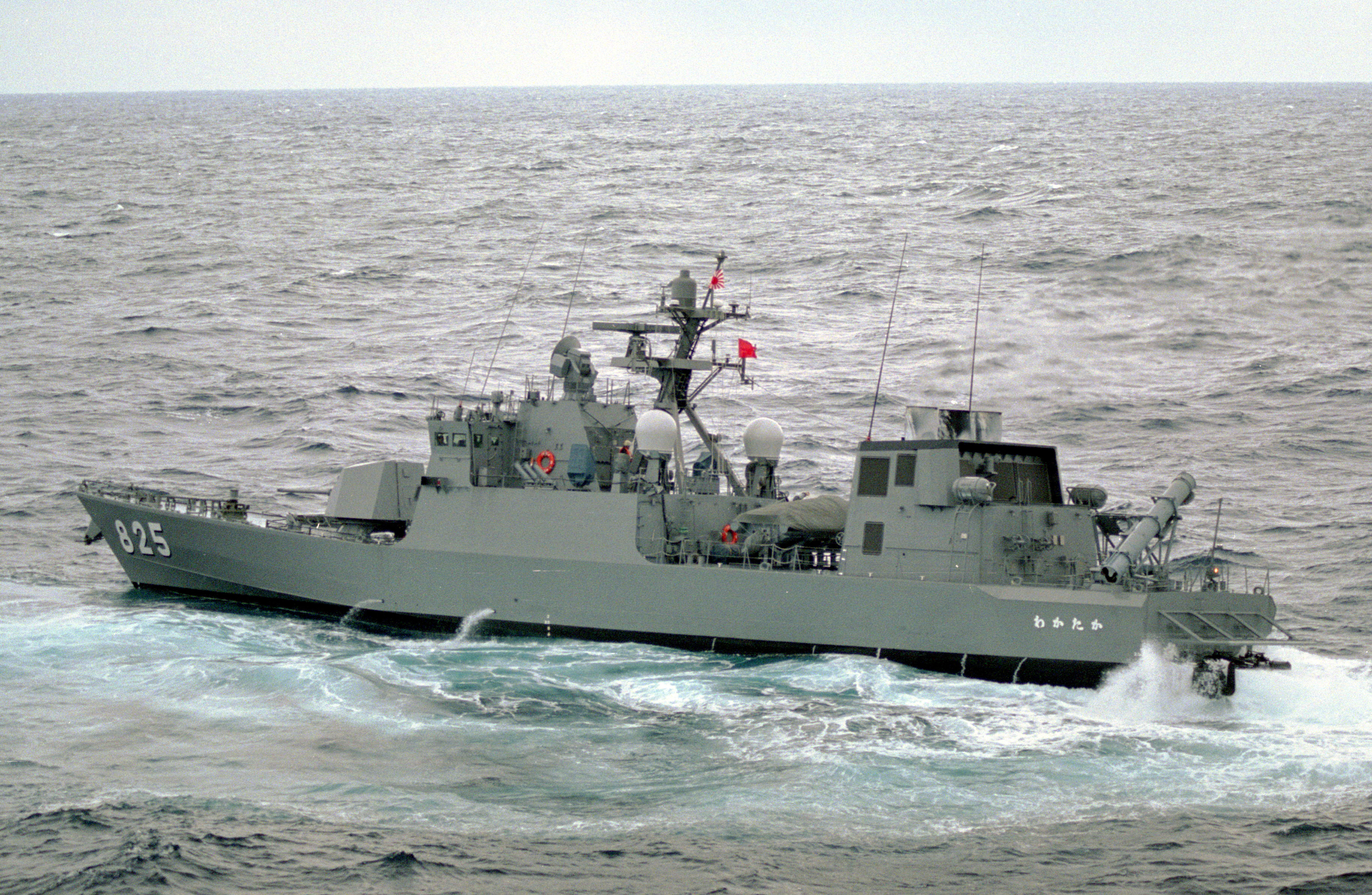 ミサイル艇わかたか